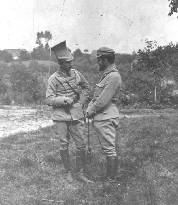 Płk. Belina-Prażmowski w rozmowie z jednym z oficerów w polu 1914 r. [Opis oryginalny]